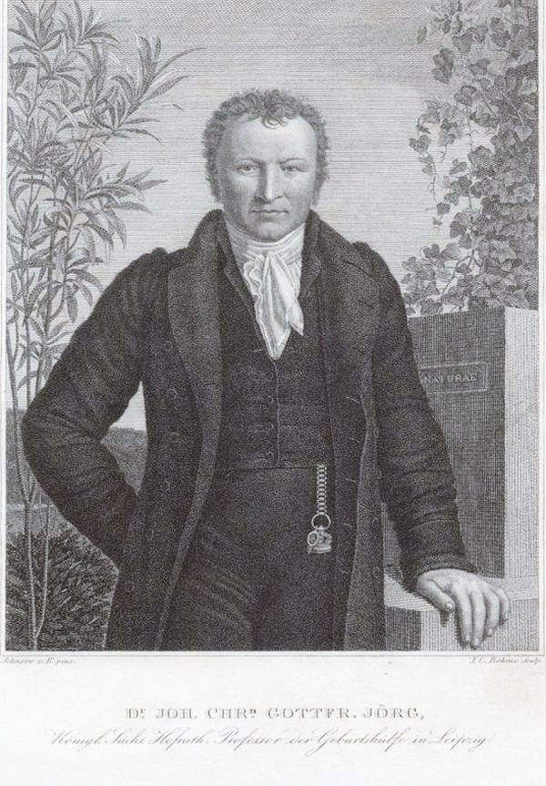 Johann Christian Gottfried Jörg, der erste Direktor des Trierschen Instituts